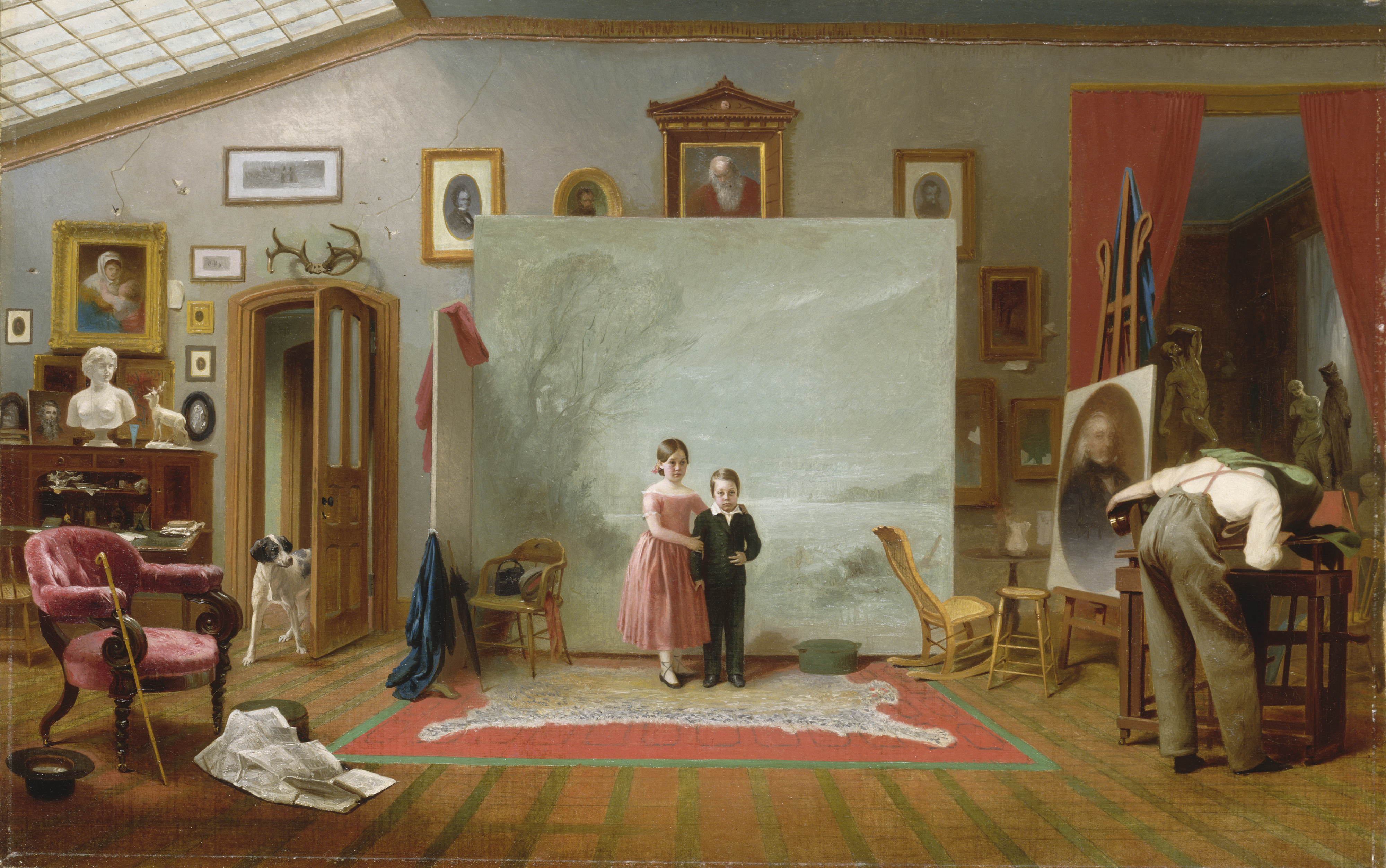 «نقاشی‌های کارگاه، نقاشی رنگ روغن اثر توماس لو کلر»این نقاشی در سال ۱۸۶۵ میلادی کشیده و یک پسر و یک دختر به نام‌های جیمز و پارنل سایدوی را در حالی که مقابل دوربین عکسبرداری در یک کارگاه ژست گرفته‌اند، نمایش می‌دهد.